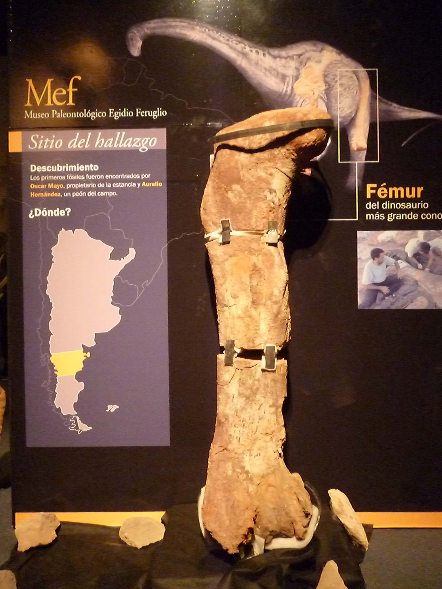 Fósiles del titanosauria del Chubut en el Museo Egidio Feruglio de Trelew, Chubut, Argentina. Descubiertos en 2013 y presentados en 2014, supuestamente se trata del animal terrestre más grande de la historia de la Tierra. Pesaría 4 toneladas más que el Argentinosaurus y su fémur mide más de dos metros.